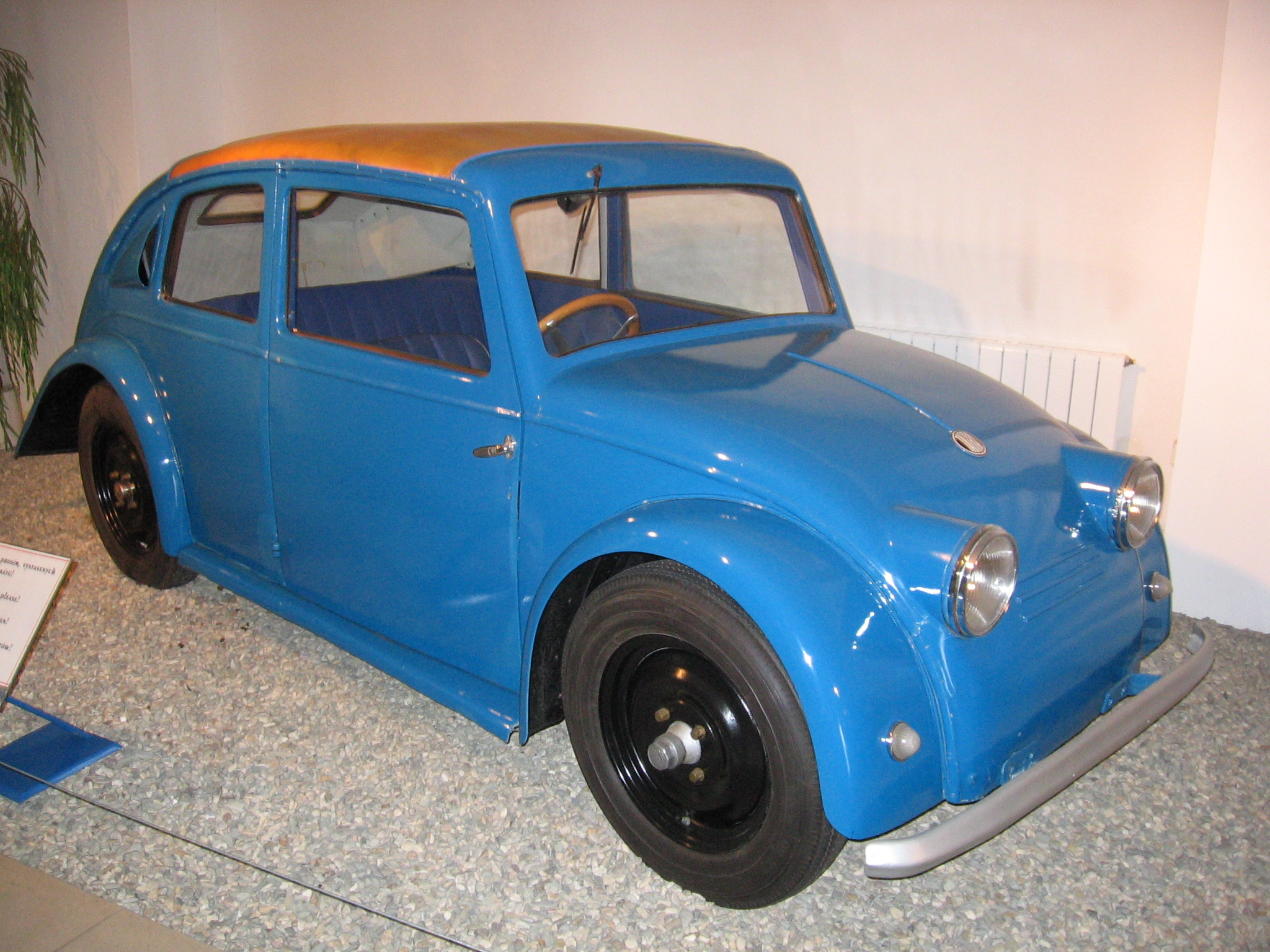 Tatra 570 prototype